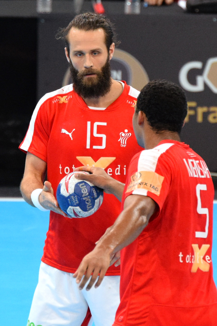 Le 10 janvier 2016 lors du match France / Danemark durant la Golden League à l'AccorHotels Arena (Paris).